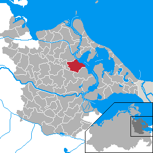 Zemitz, Landkreis Ostvorpommern, Mecklenburg-Vorpommern